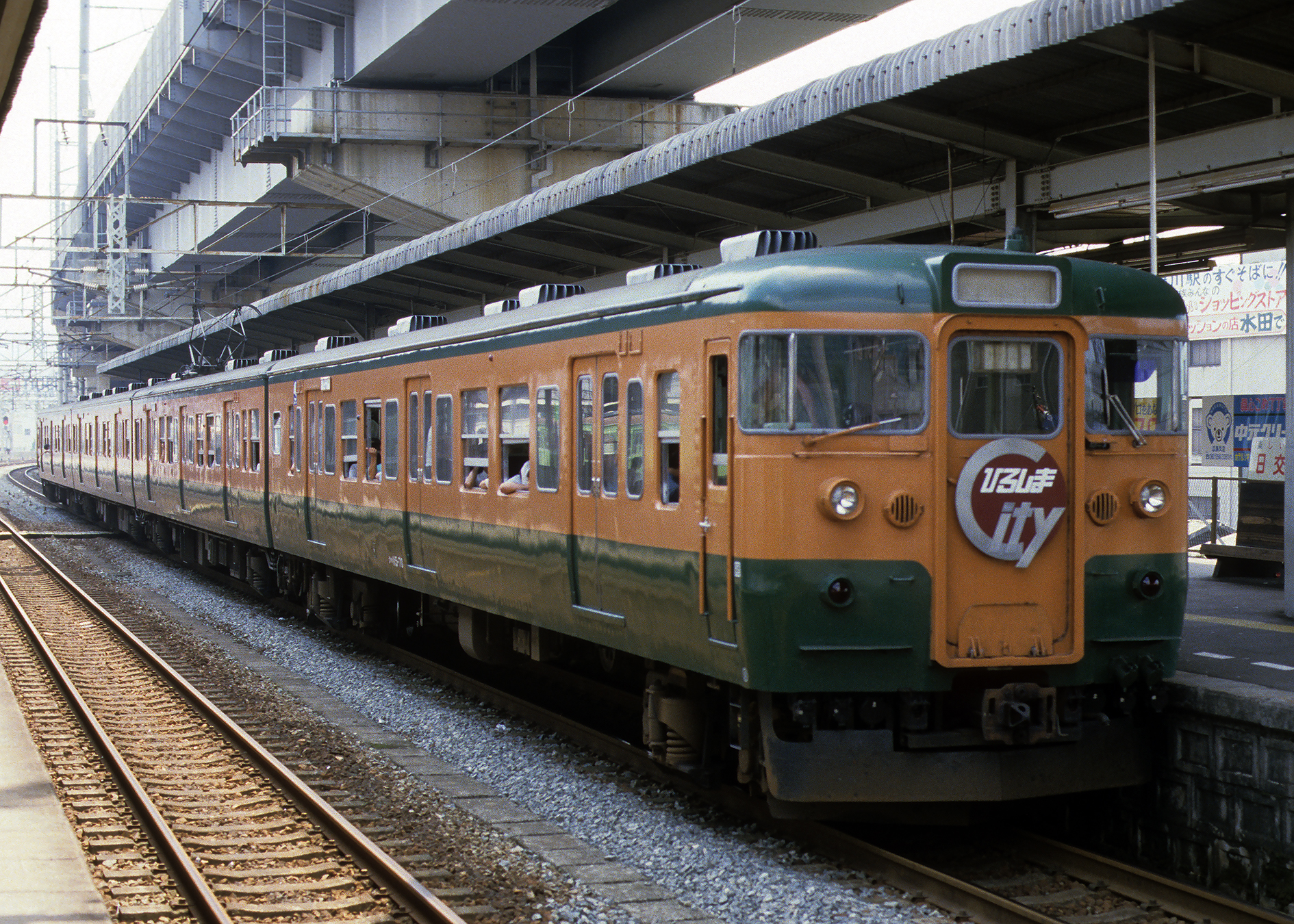 国鉄115系電車 ひろしまシティ電車 クハ115－70 横川駅